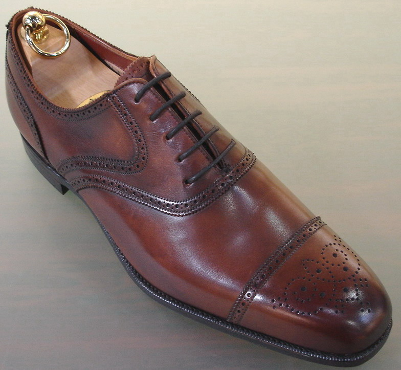 Halfbrogue (Grenson)